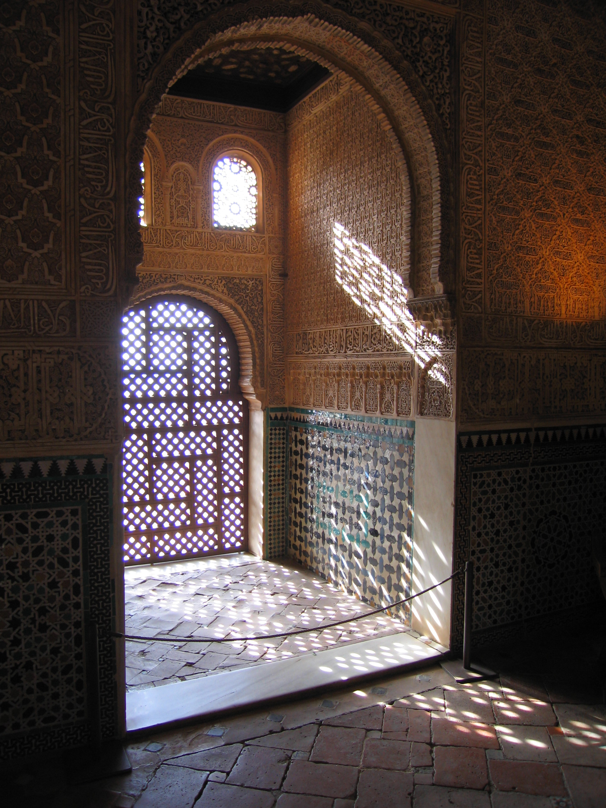 Alhambra, Granada, SpainPalacio Nazaries, Alhambra, Granada